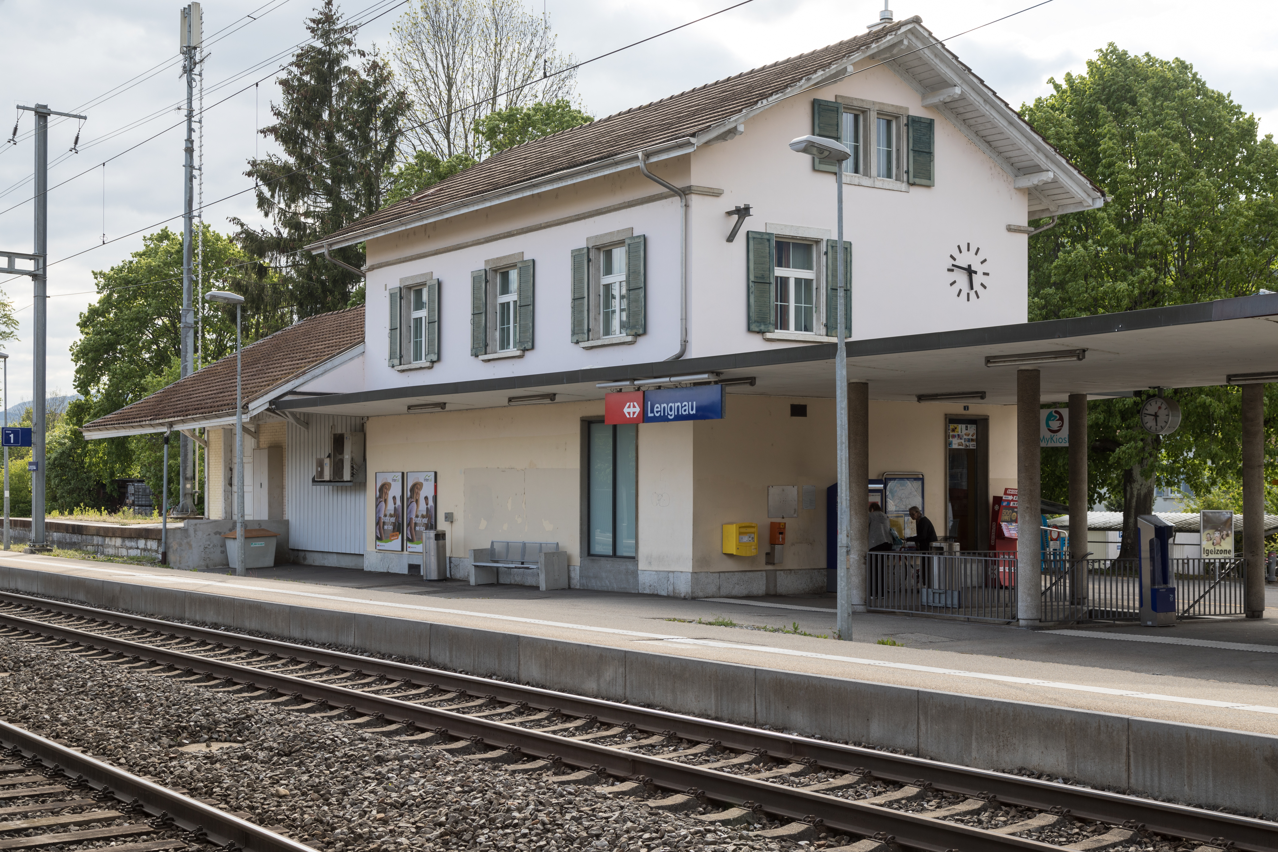 Bahnhof Lengnau BE an der Strecke zwischen Grenchen und Biel/Bienne